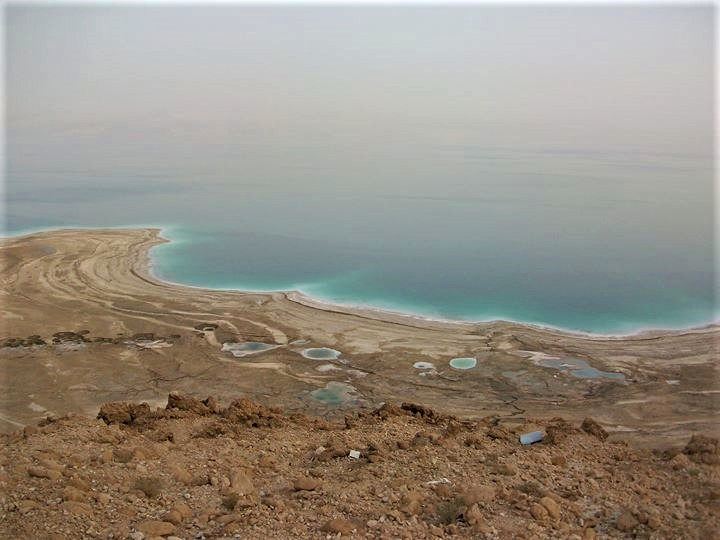 Dead Sea sinkholes near Ein Gedi, Israel: As the Dead Sea continues to deplete, massive sinkholes open along its banks.